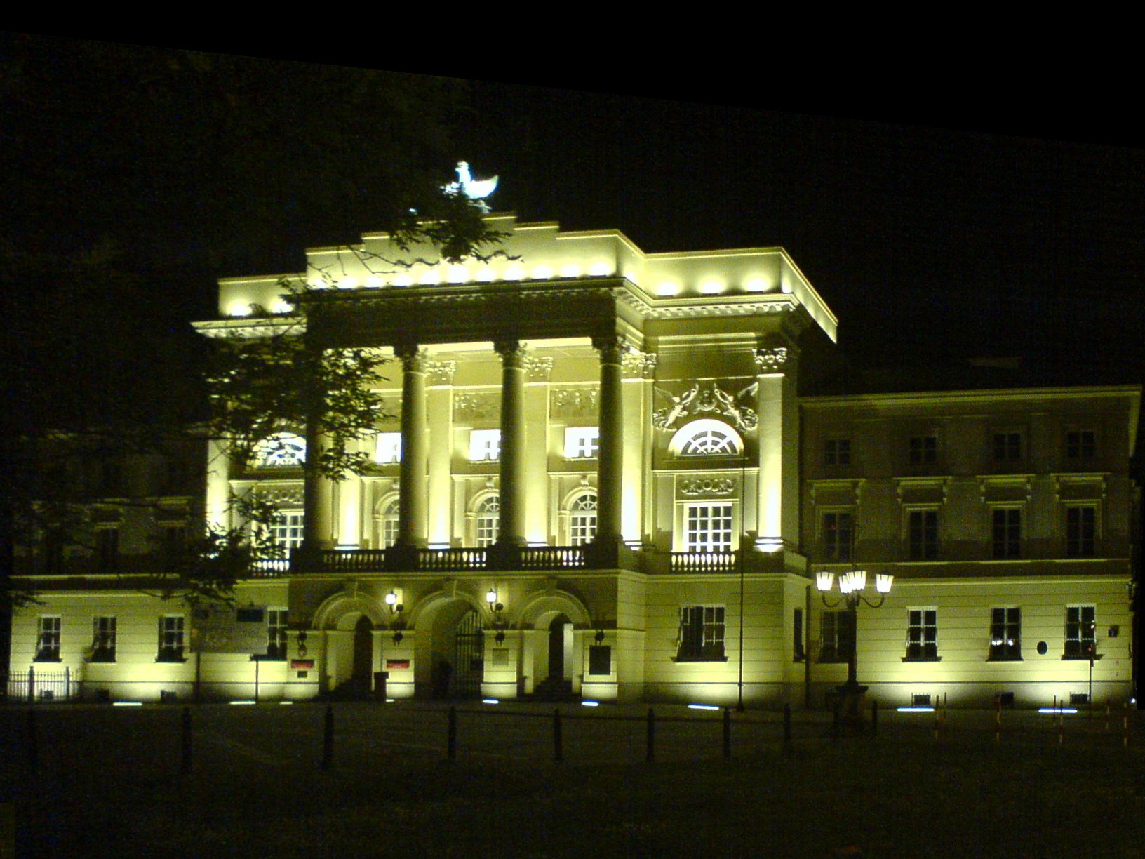 PL, Warszawa, Pałac Mostowskich (Komenda Stołeczna Policji), ul. Nowolipie 2 (widok od frontu, nocą)